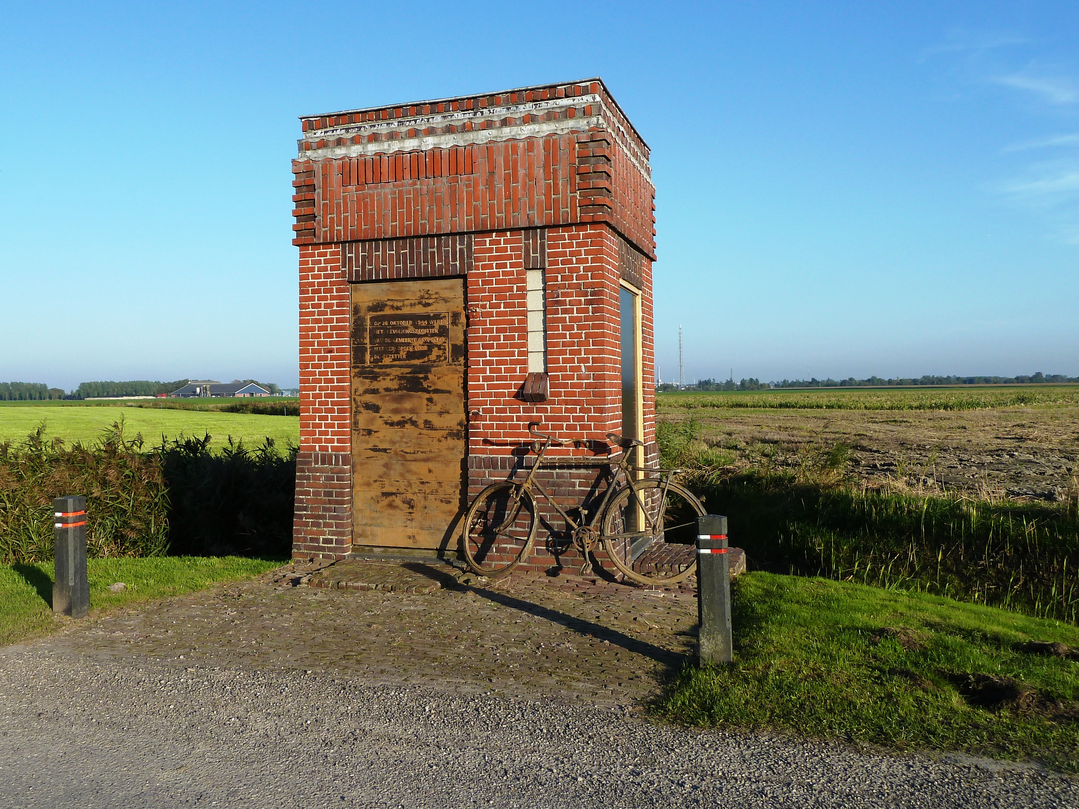 Het transformatorhuisje aan de Bosscherweg tussen de provinciale weg van Grijpskerk naar Buitenpost en de weg van Pieterzijl naar de kruising naar 't Hoekje en Munnekezijl. Oorlogsmonument met sculptuur van Gert Sennema.